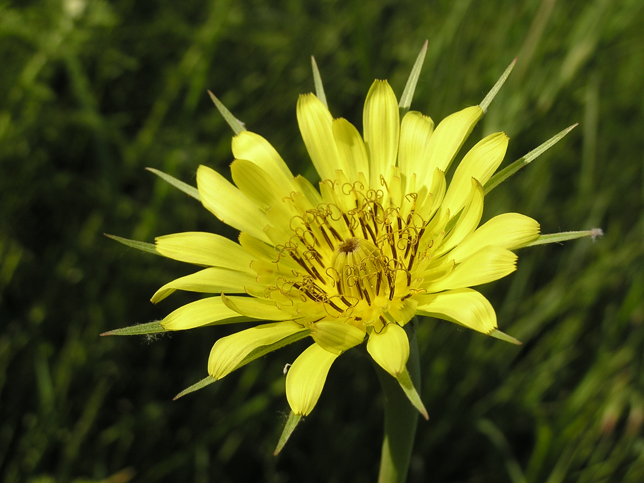 Растение